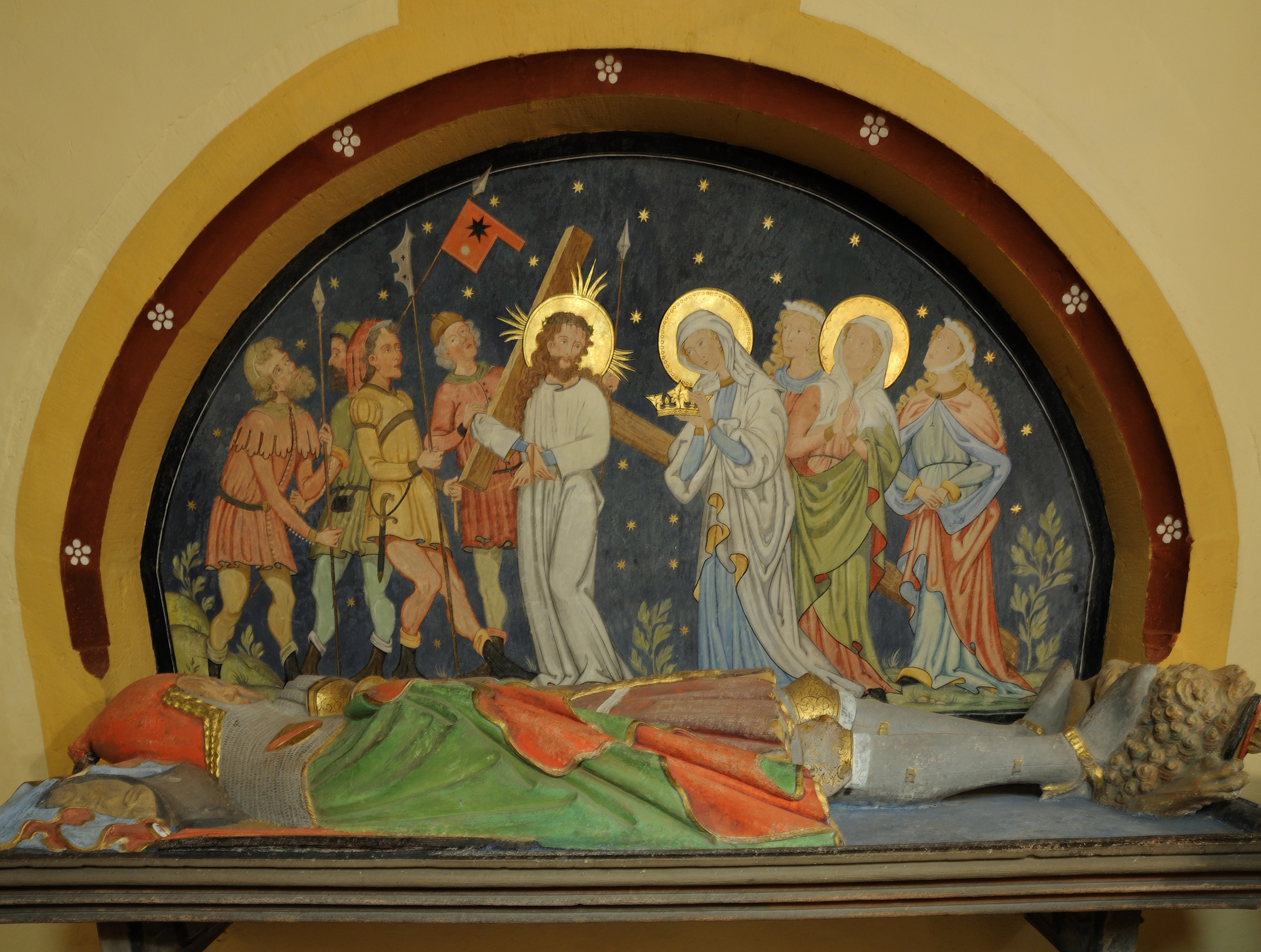 Galluskirche Lörrach: Grabnische von Rudolf III. in der Grabkapelle